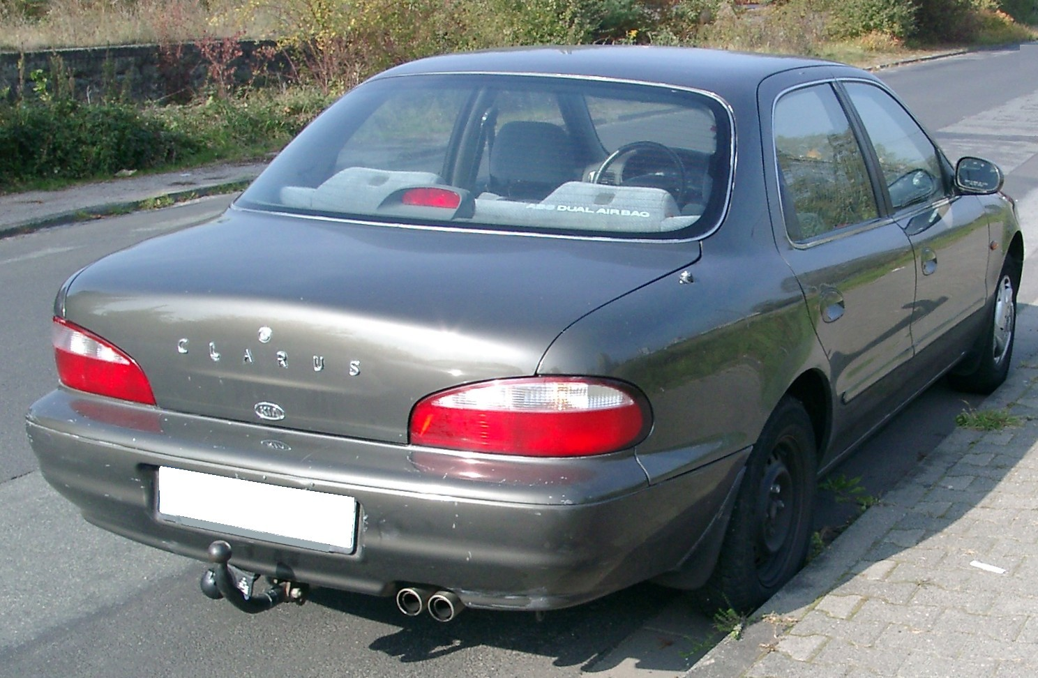 Kia Clarus